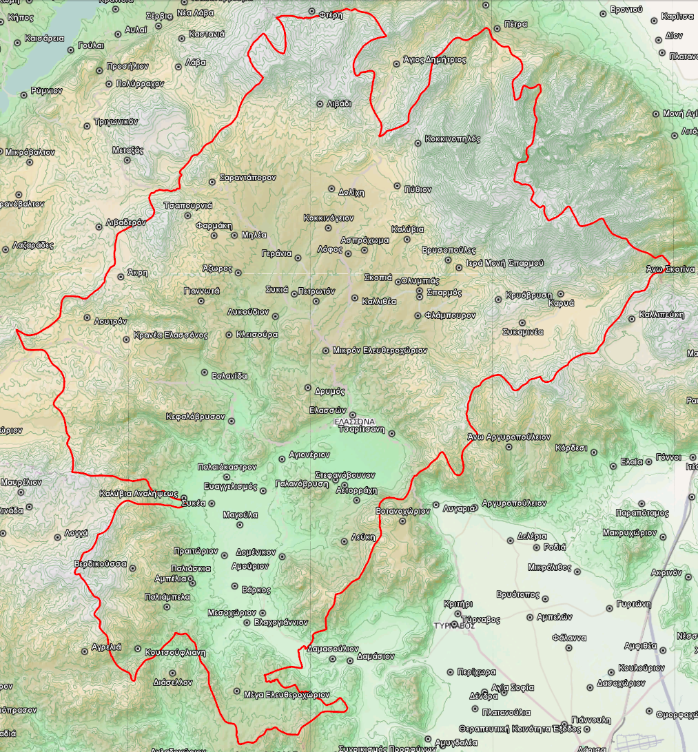 Τοπογραφικός χάρτης του Δήμου